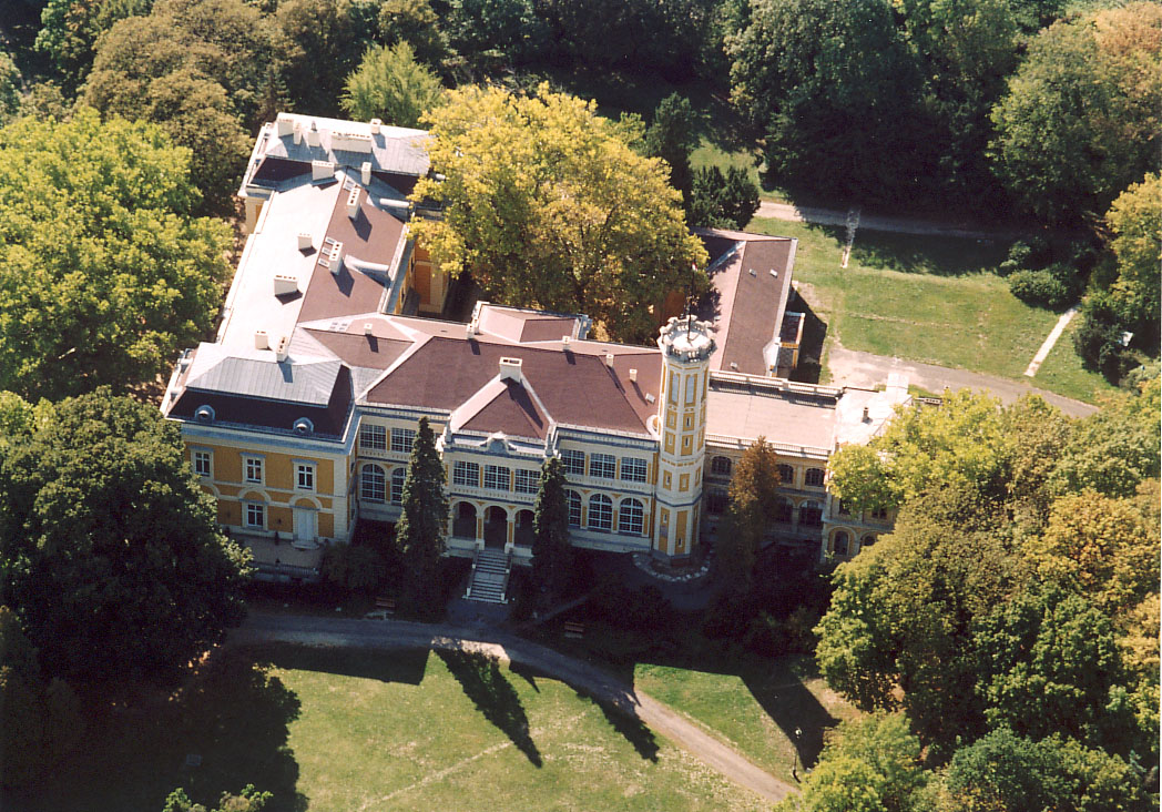 Palace - Füzérradvány - Hungary - Europe (Károlyi Mansion)